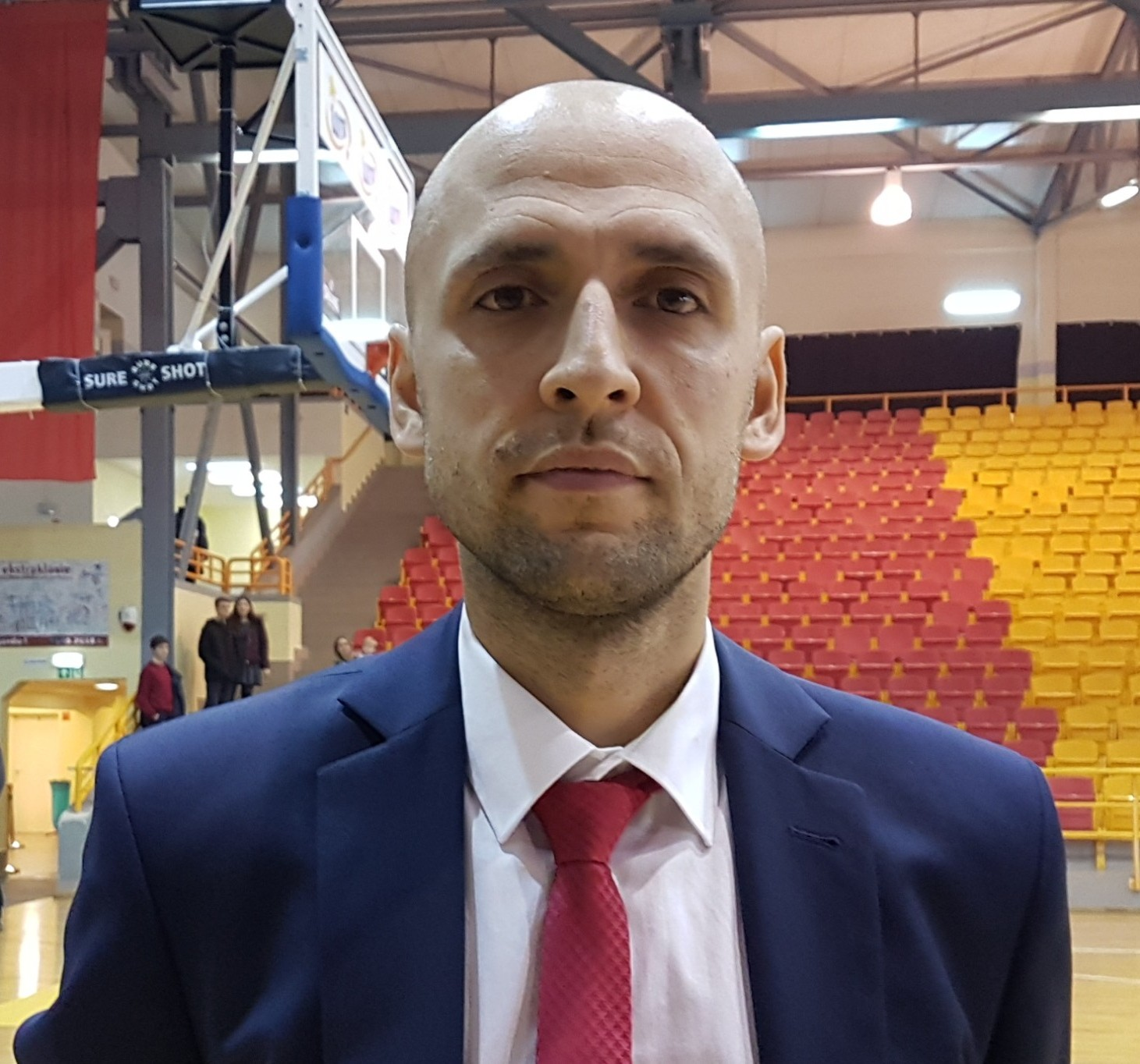 Kamil Piechucki